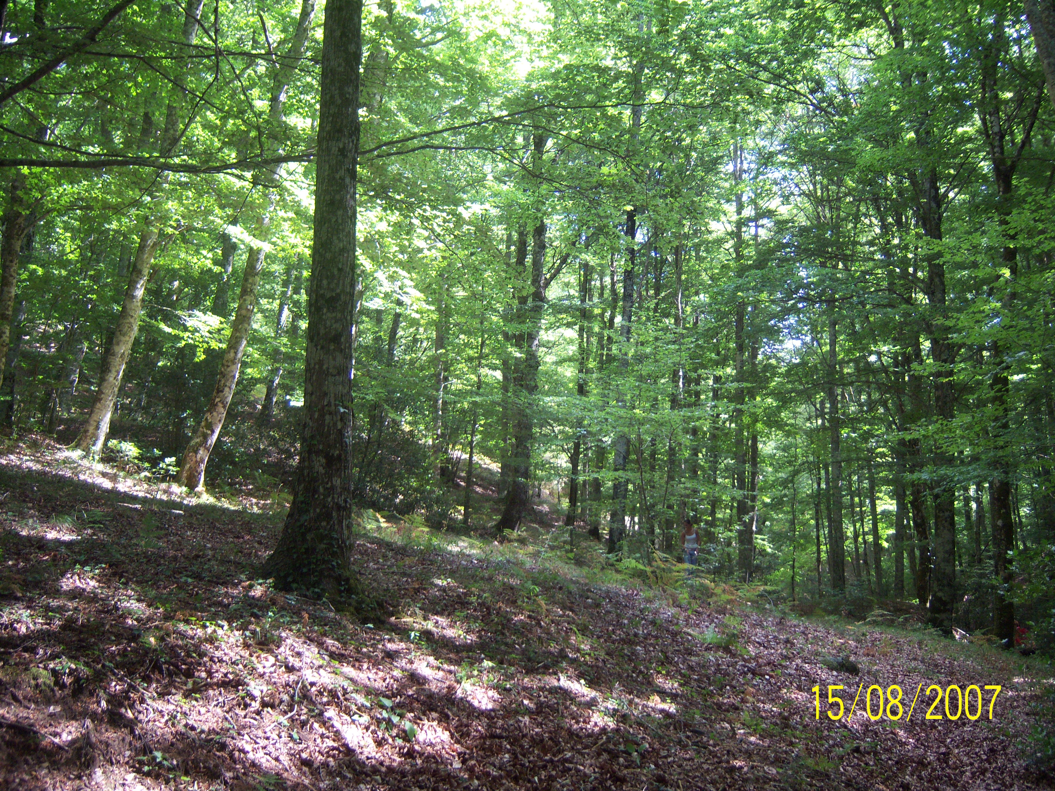 Ferdinandea